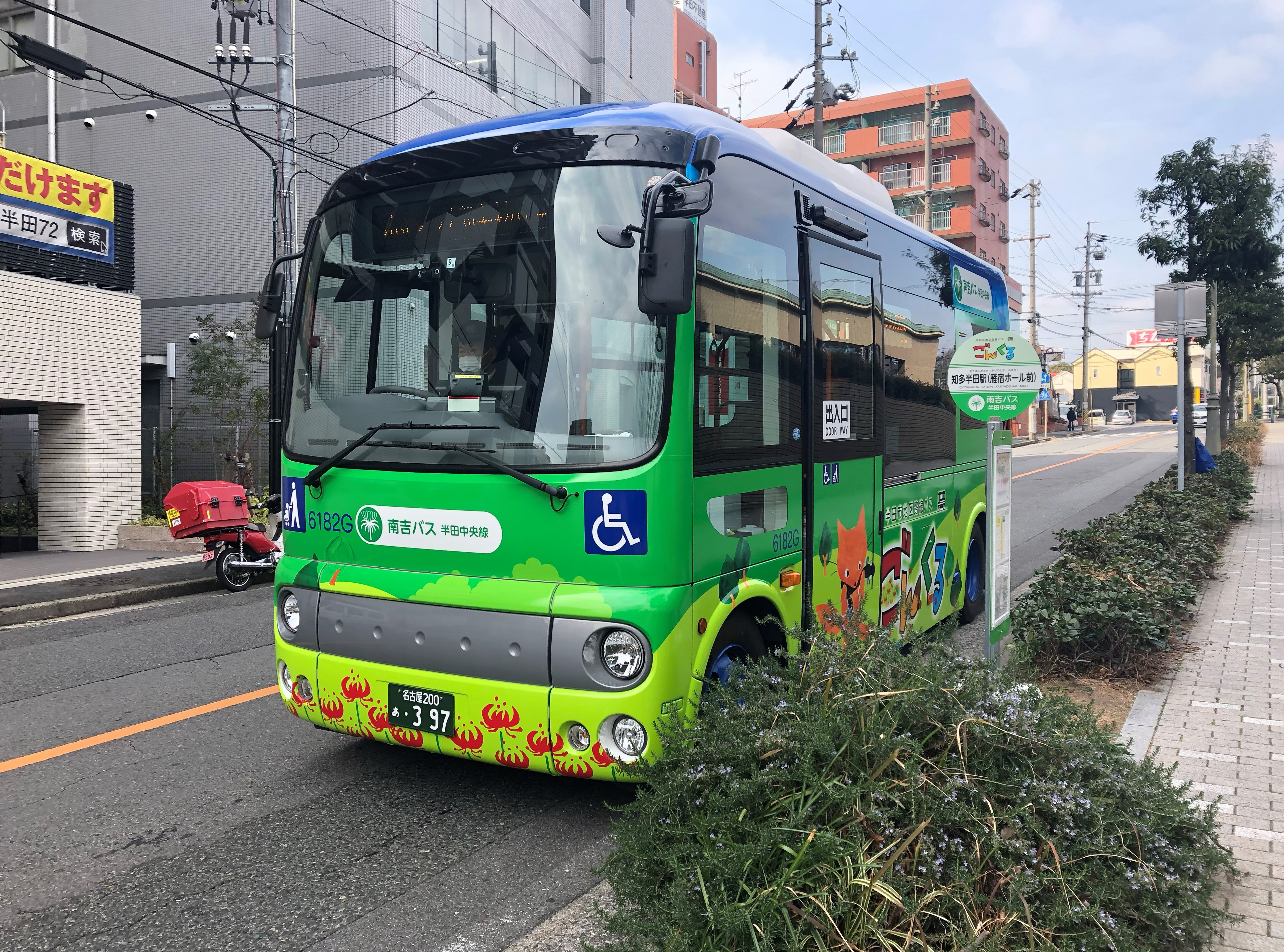 雁宿ホール前バス停で撮影